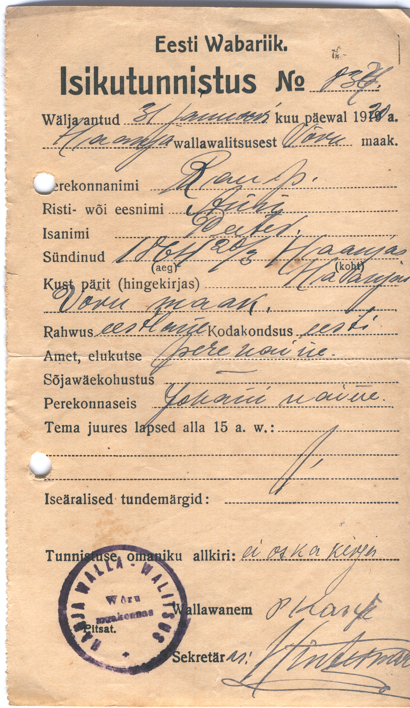 Eesti Vabariigi isikutunnistus nr.837 Anni Raupile Haanja Vallavalitsuselt 31. jaanuaril 1920